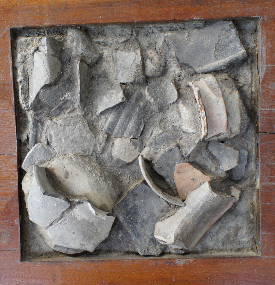 中文（台灣）: 惠來遺址陶片。